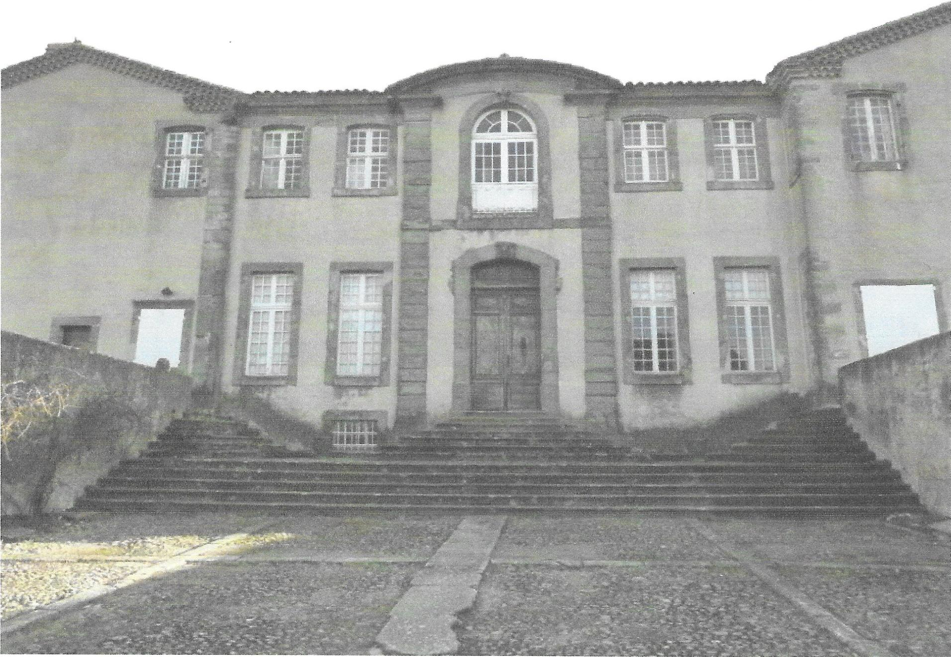 La façade nord